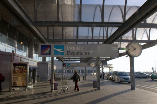 Ferihegy 2A